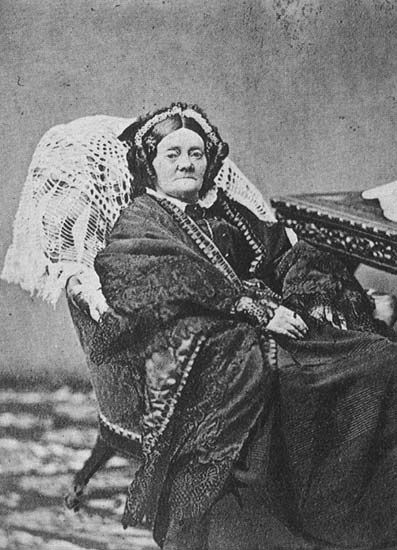 Мария Павловна Сумарокова (1786—1883)